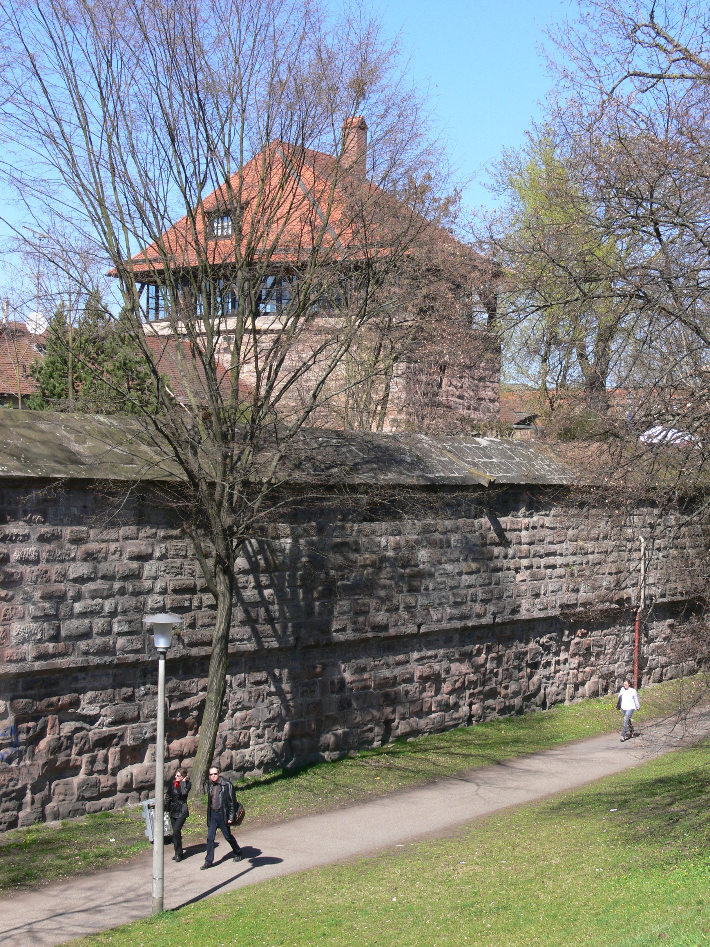 Nürnberg, Hintere Insel Schütt, Turm Schwarzes Z (Hintere Insel Schütt Nr. 34), auch „Krakauer Haus“ genannt, einer der beiden „Wehrtürme am Tratzenzwinger“, Feldseite